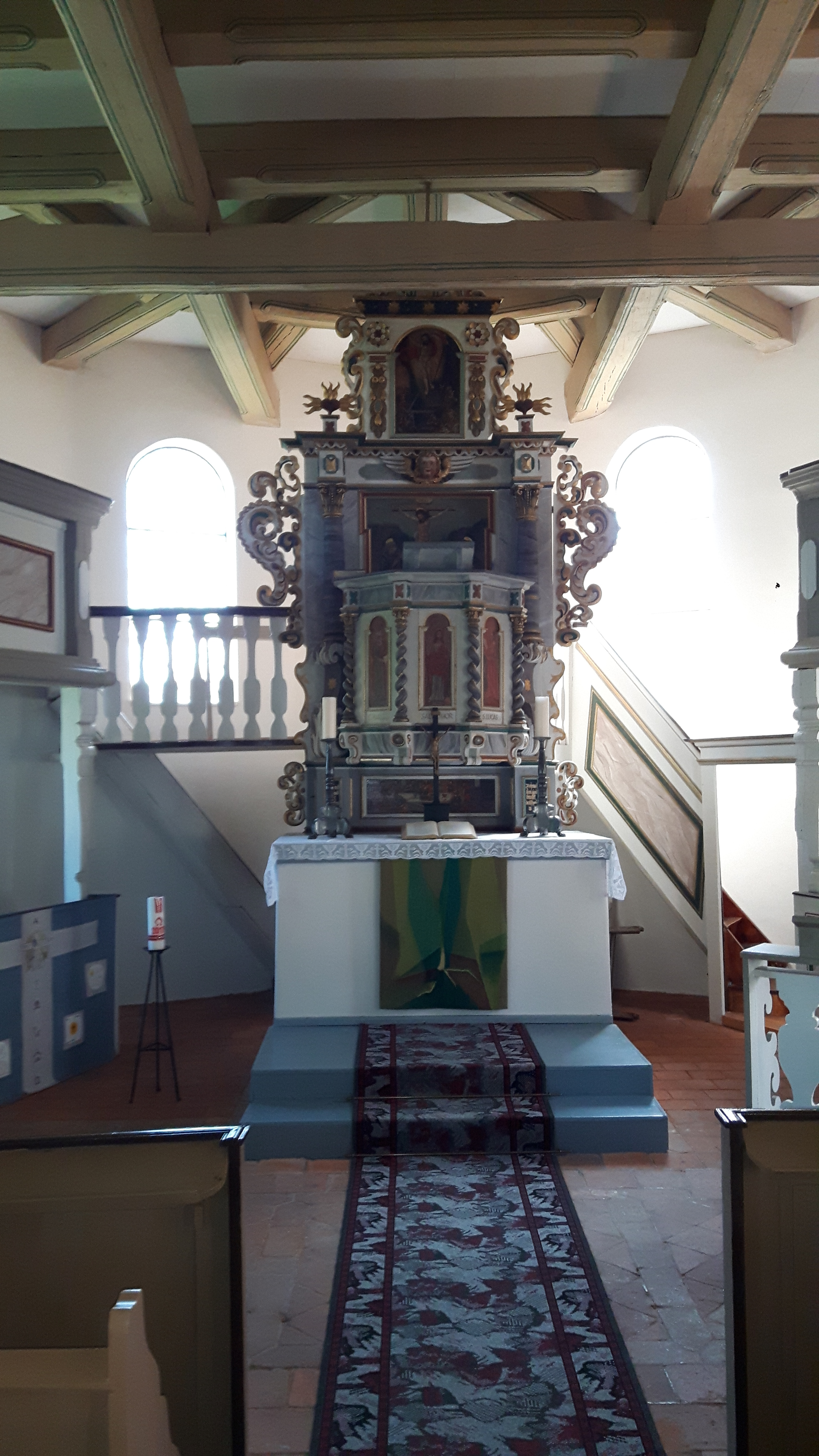 Der historische Kanzelaltar aus der Dorfkirche Schönwalde, Landkreis Dahme-Spreewald, Brandenburg. Der Altar stammt vermutlich aus dem Jahr 1686, wurde 18. Jahrhundert umgebaut und 1968 restauriert. Der Altar ist in seinem Schmuckreichtum von der Spätrenaissance geprägt.